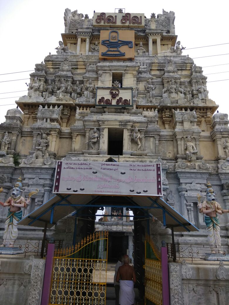 சிருங்காண்டீஸ்வரர் கோயிலின் நுழைவு வாயில்